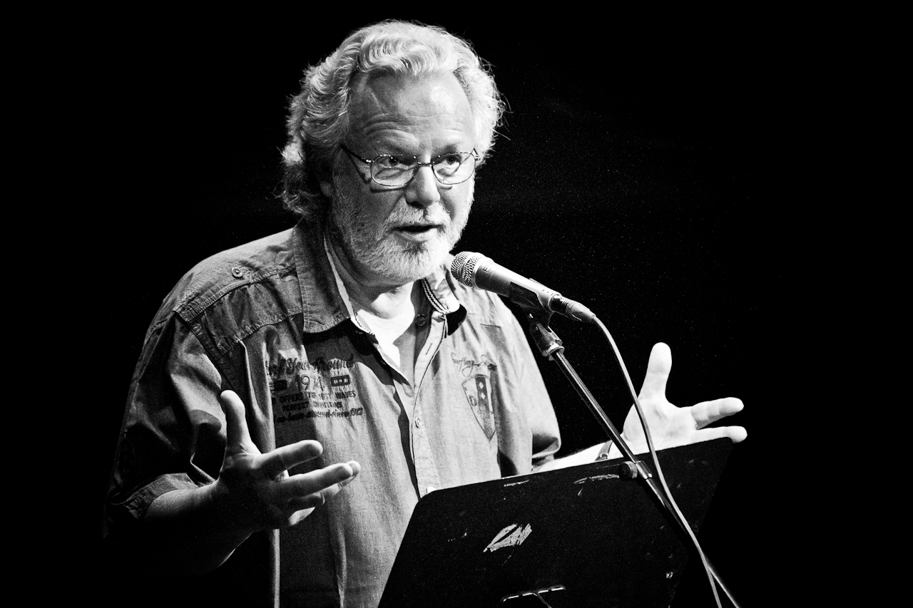 Měsíc autorského čtení 2014